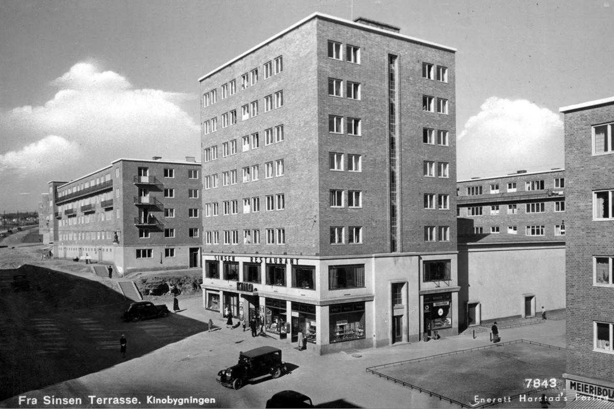 Sinsen, kinobygningen